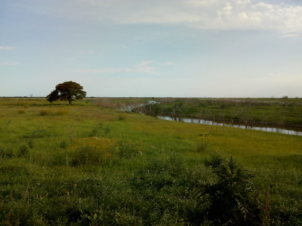 Paisaje en donde se aprecia la llanura que caracteriza a esta provincia.